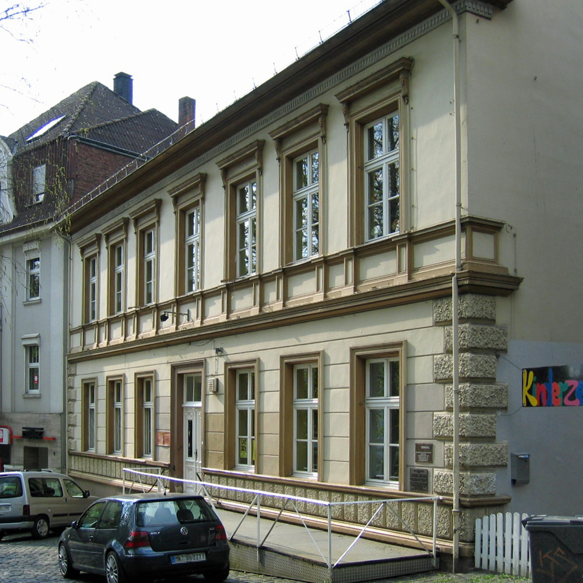 Bürgerhaus in Menden (Sauerland), Kirchplatz 3. 1864 erbaut als Höhere Stadtschule. Rathaus von 1886 bis 1912. Amtsgericht von 1913 bis 1958. Polizeiwache von 1959 bis in die 1970er Jahre. This image shows a heritage building in Germany, located in the North Rhine-Westphalian city Menden (Sauerland) (no. 128).